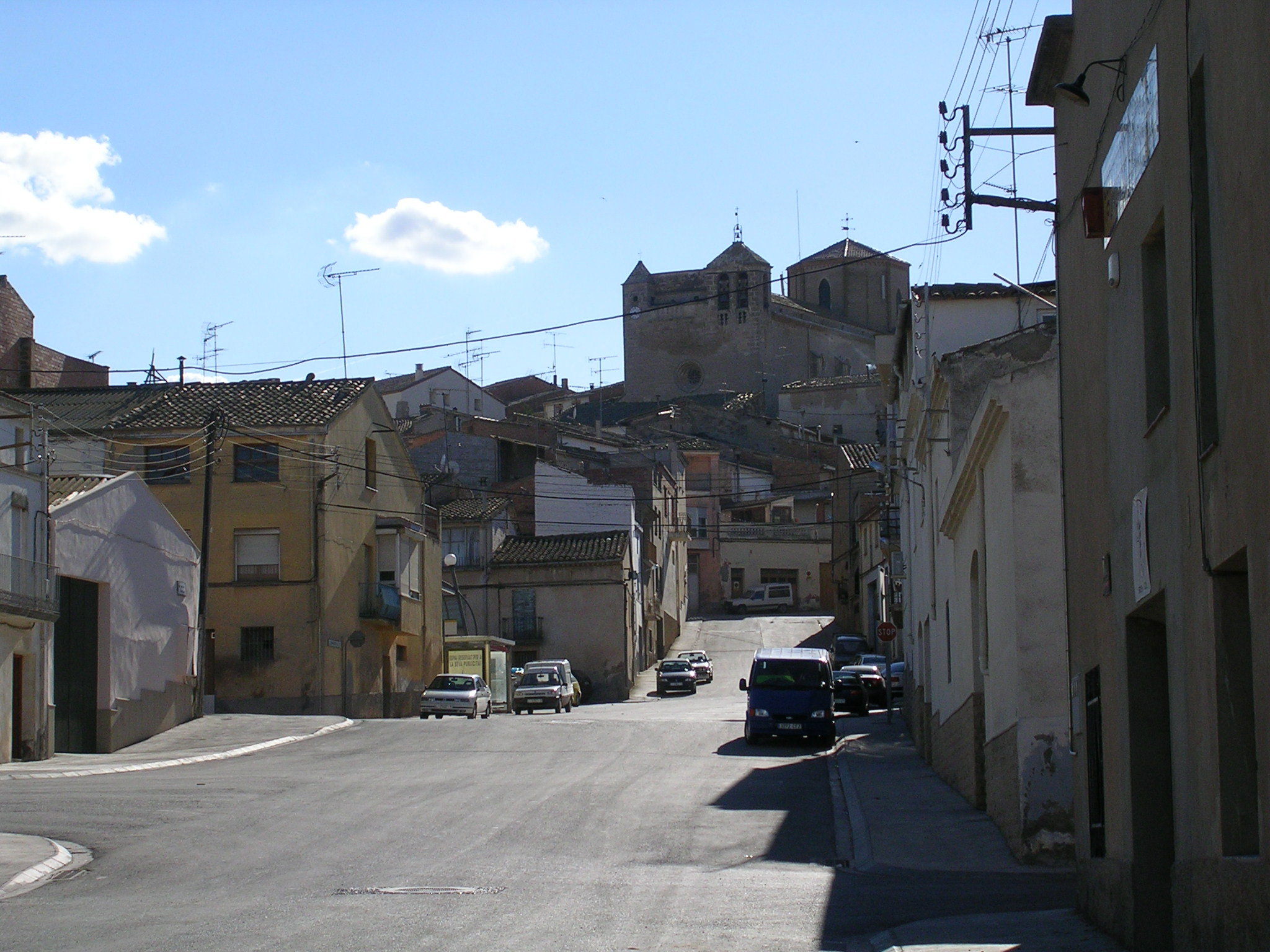 Carrer la creu (Miralcamp a la província de Lleida)